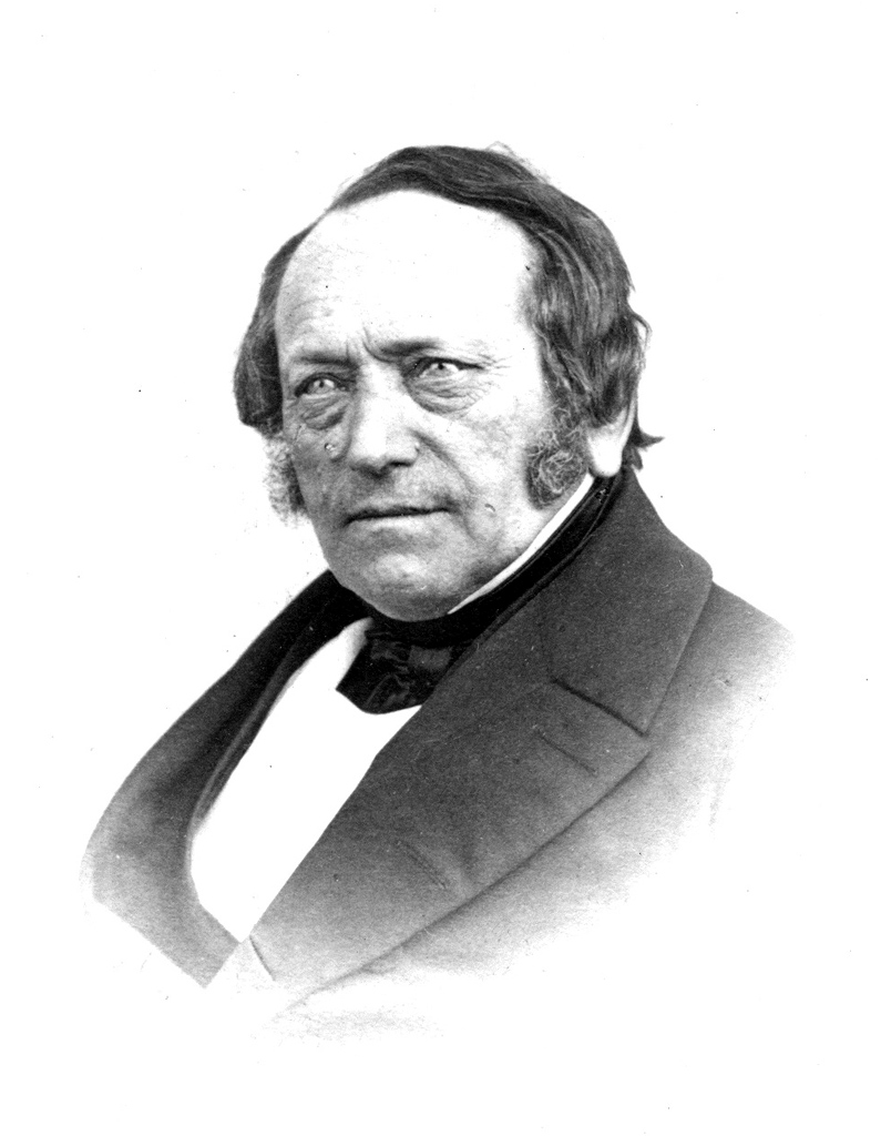 Johannes Winnertz, *11.1.1800, +24.07.1896 oder 1890